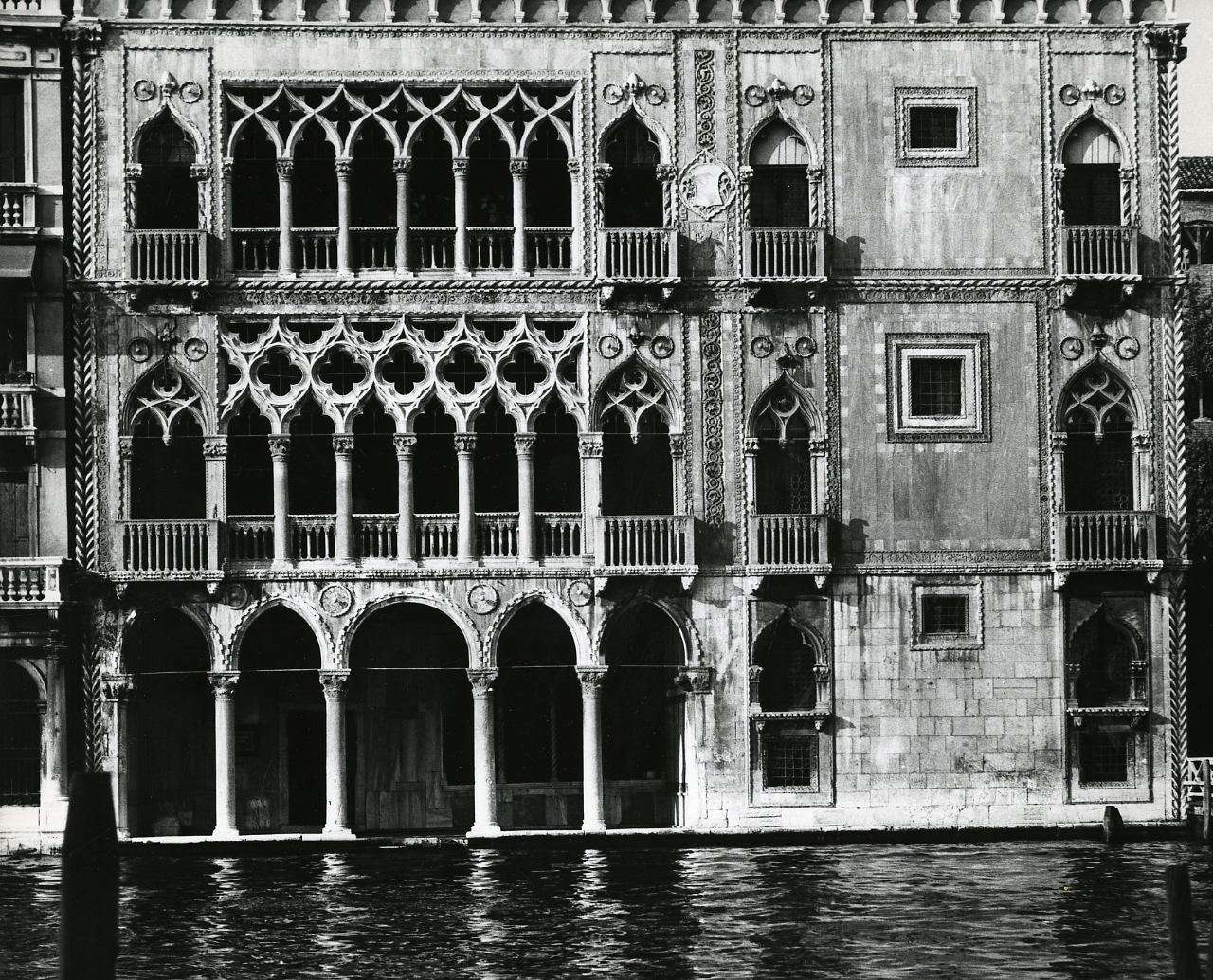 Servizio fotografico : Venezia, 1977 / Paolo Monti. - Stampe: 6 : Positivo b/n, gelatina bromuro d'argento/ carta, 24x30. - ((Al verso delle stampe manoscritti i numeri dei negativi corrispondenti (formato 35 mm) con indicazione del fotogramma: 18/3, 318, 517/68, 518/31, 836/[tagliato], 850/14; iscrizioni didascaliche manoscritte a matita; timbro a inchiostro con copyright: "© - Credit to:/ Paolo Monti/ Via T. Tasso [...]/ Milano [...]". - Sul coperchio della scatola iscrizione didascalica manoscritta a pennarello nero: "Venezia". - Fonte: Monografia di Chiesa Butazzi, Grazietta: Venezia e la sua gondola, Milano, Görlich (1974)